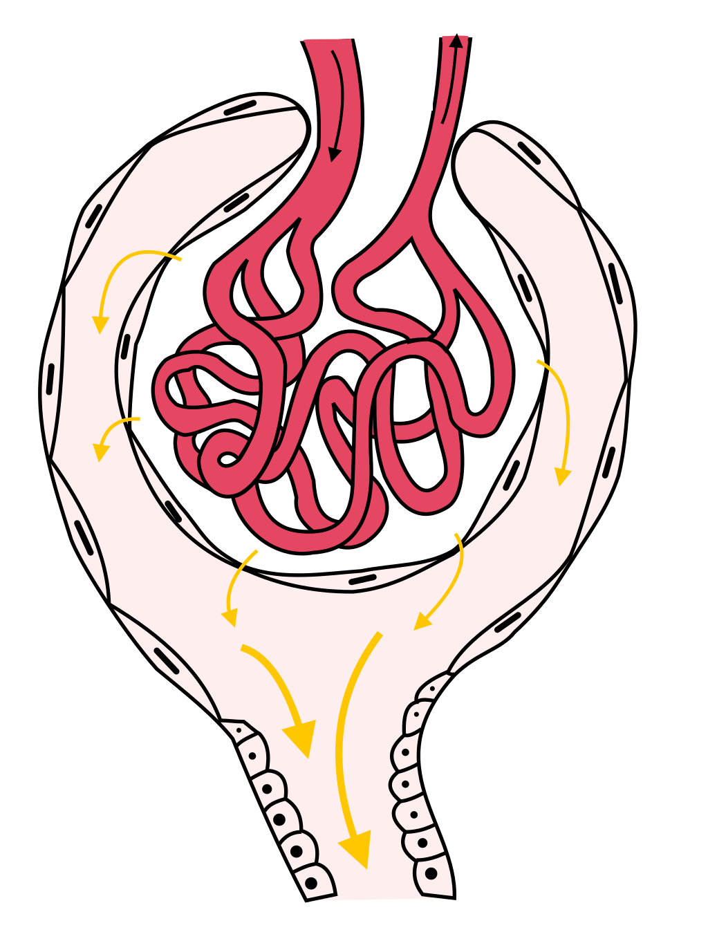 A vese glomerulusának vázlatos rajza